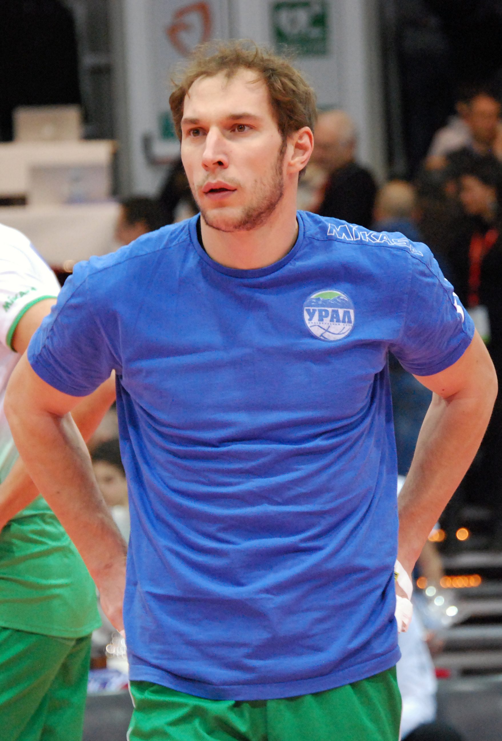 Andrey Ashchev